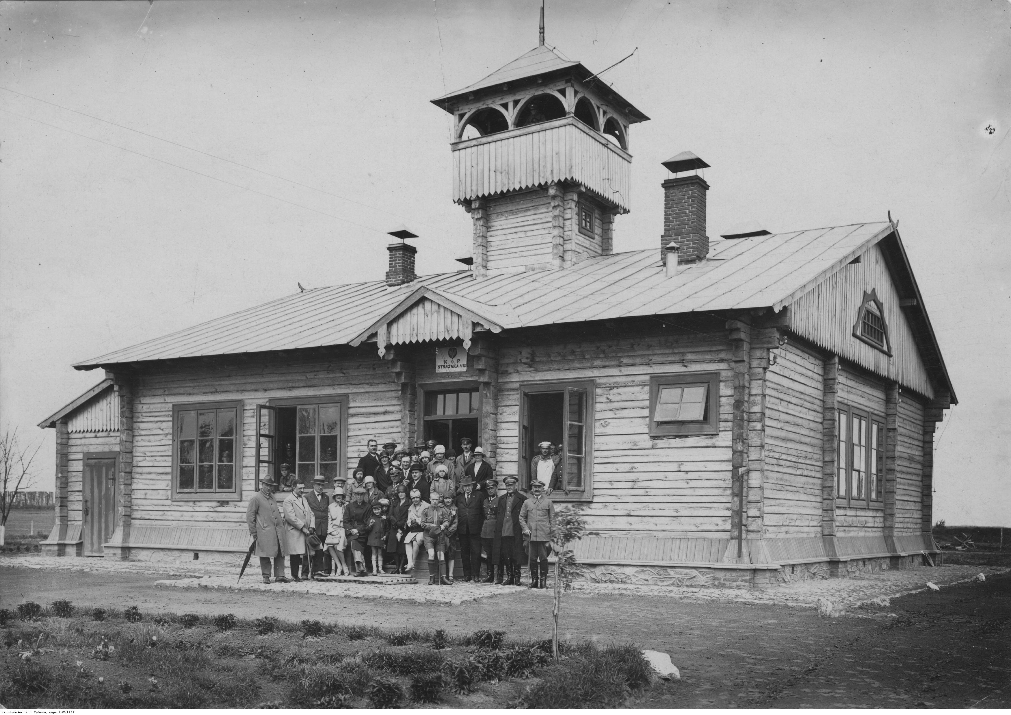 Strażnica Korpusu Ochrony Pogranicza nr 96 w Korcu na Wołyniu. Fotografia grupowa żołnierzy i ludności cywilnej na tle strażnicy. Koncern Ilustrowany Kurier Codzienny - Archiwum Ilustracji